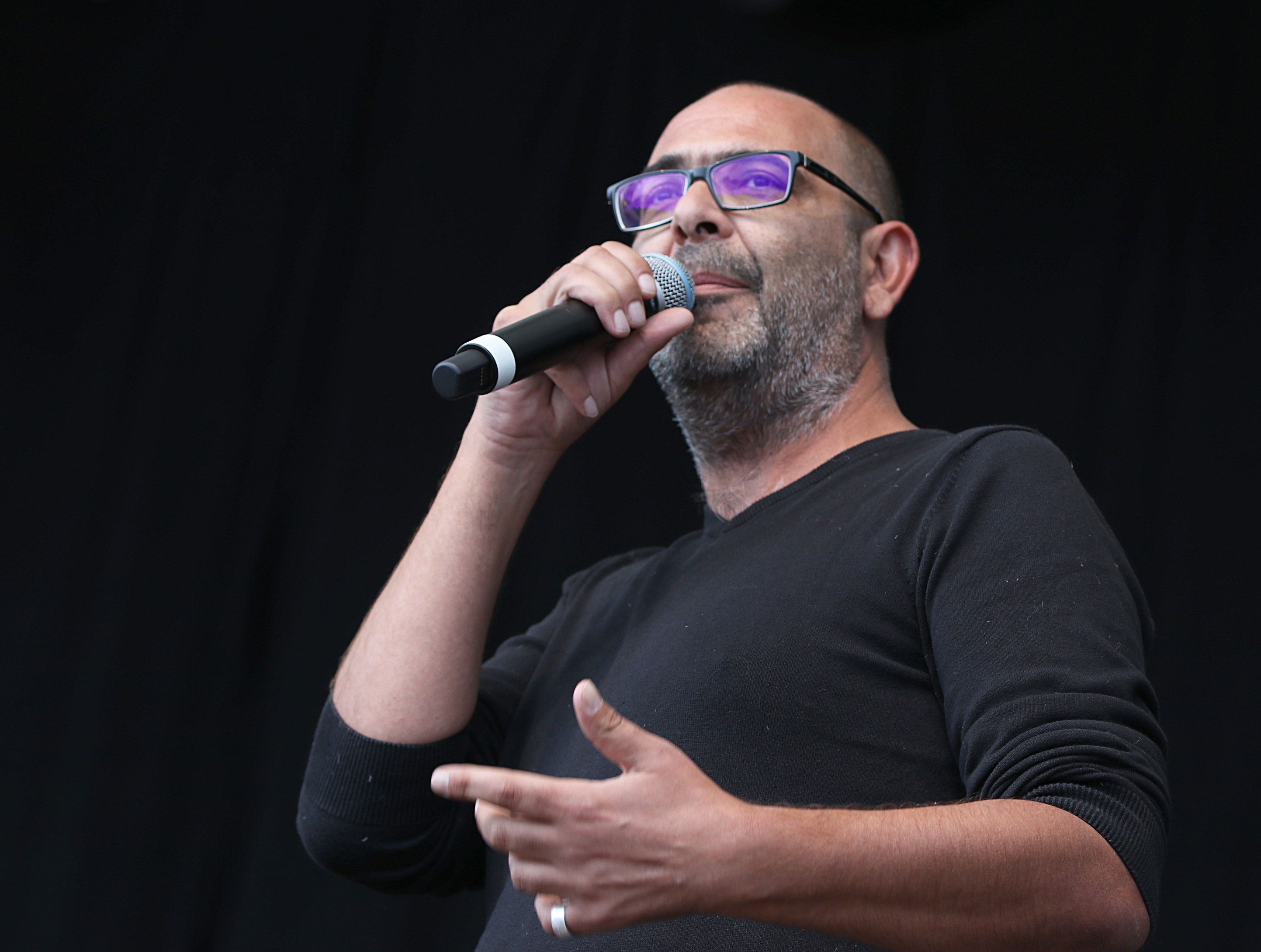 Ausgehetzt, Demonstration in München am 22. Juli 2018 gegen den Rechtsruck in der bayerischen Politik